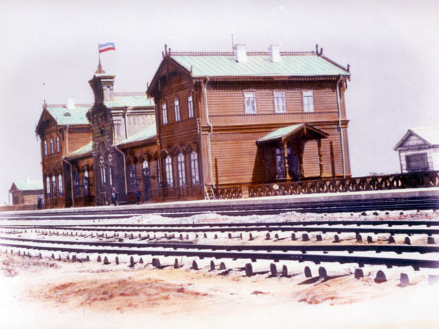 Станция Ростов (ныне Ростов-Ярославский)